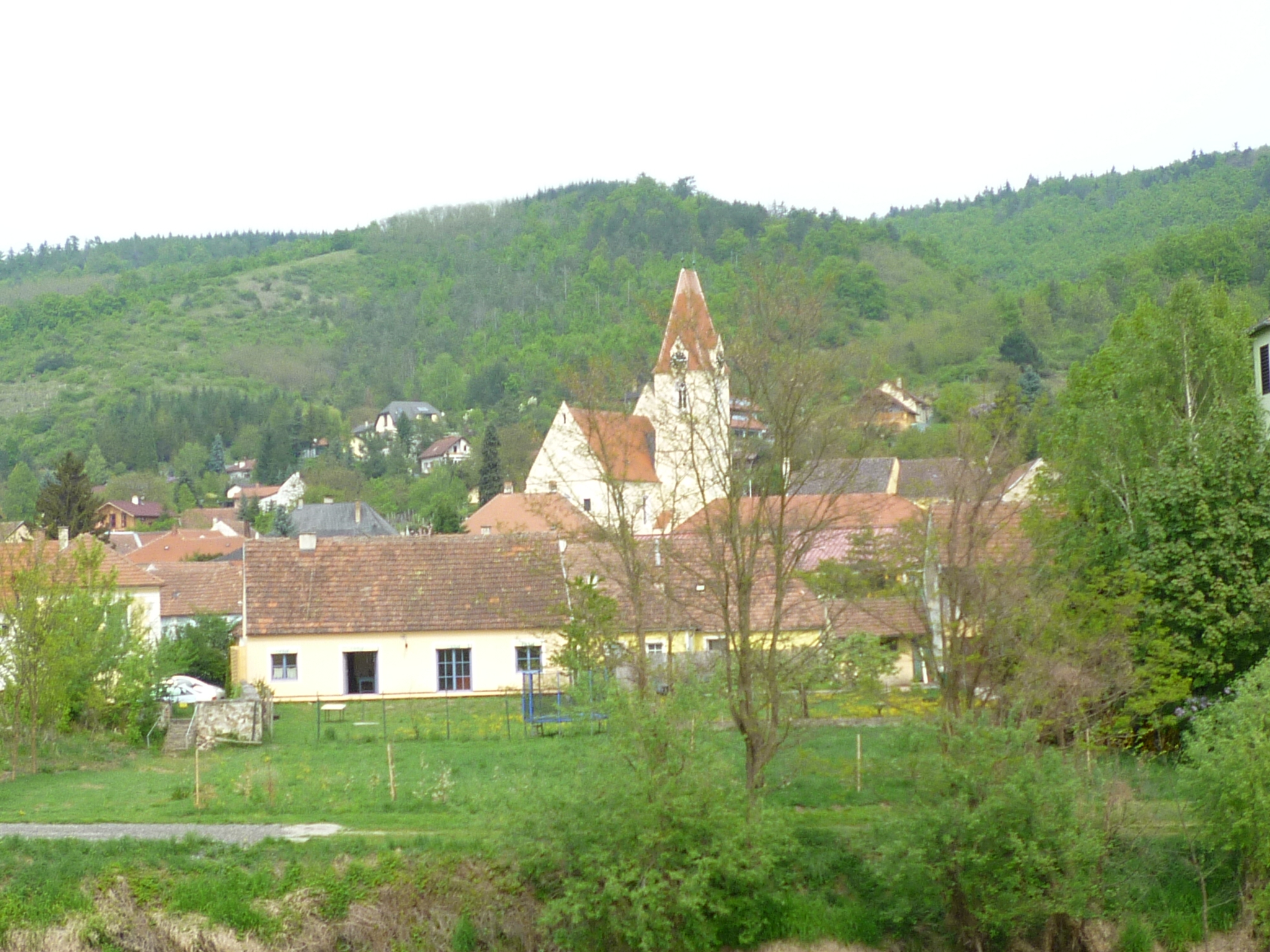 Schönberg am Kamp, Niederösterreich, Österreich.